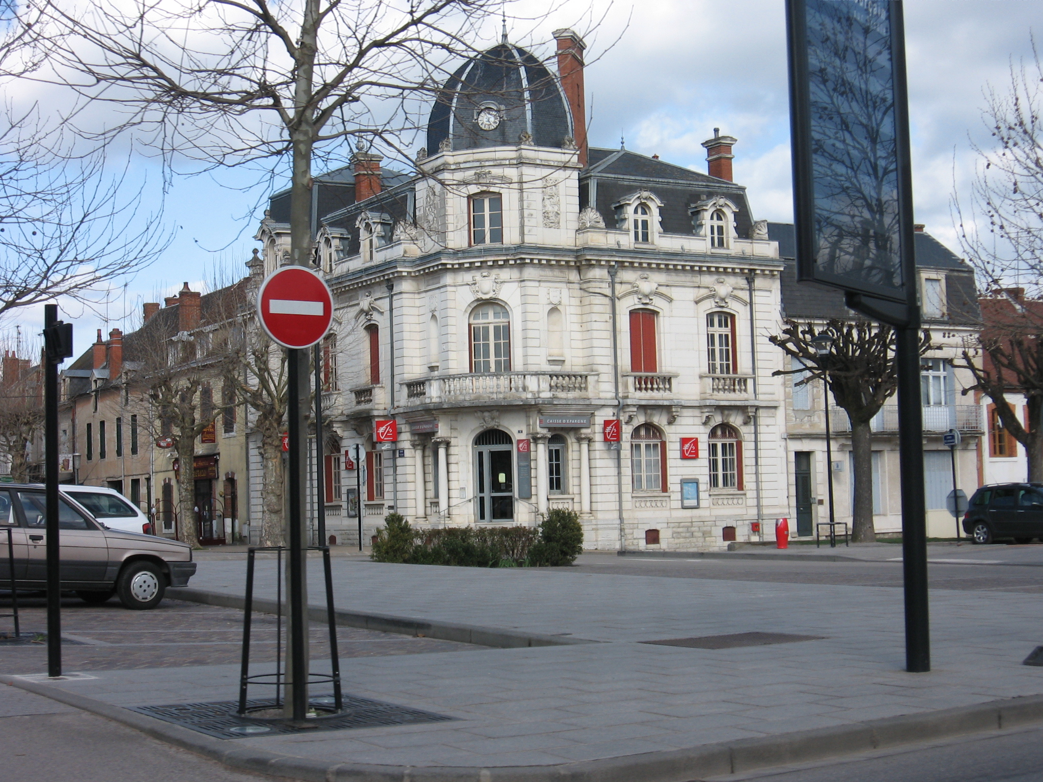 Saint-Pourçain-sur-Sioule , Allier